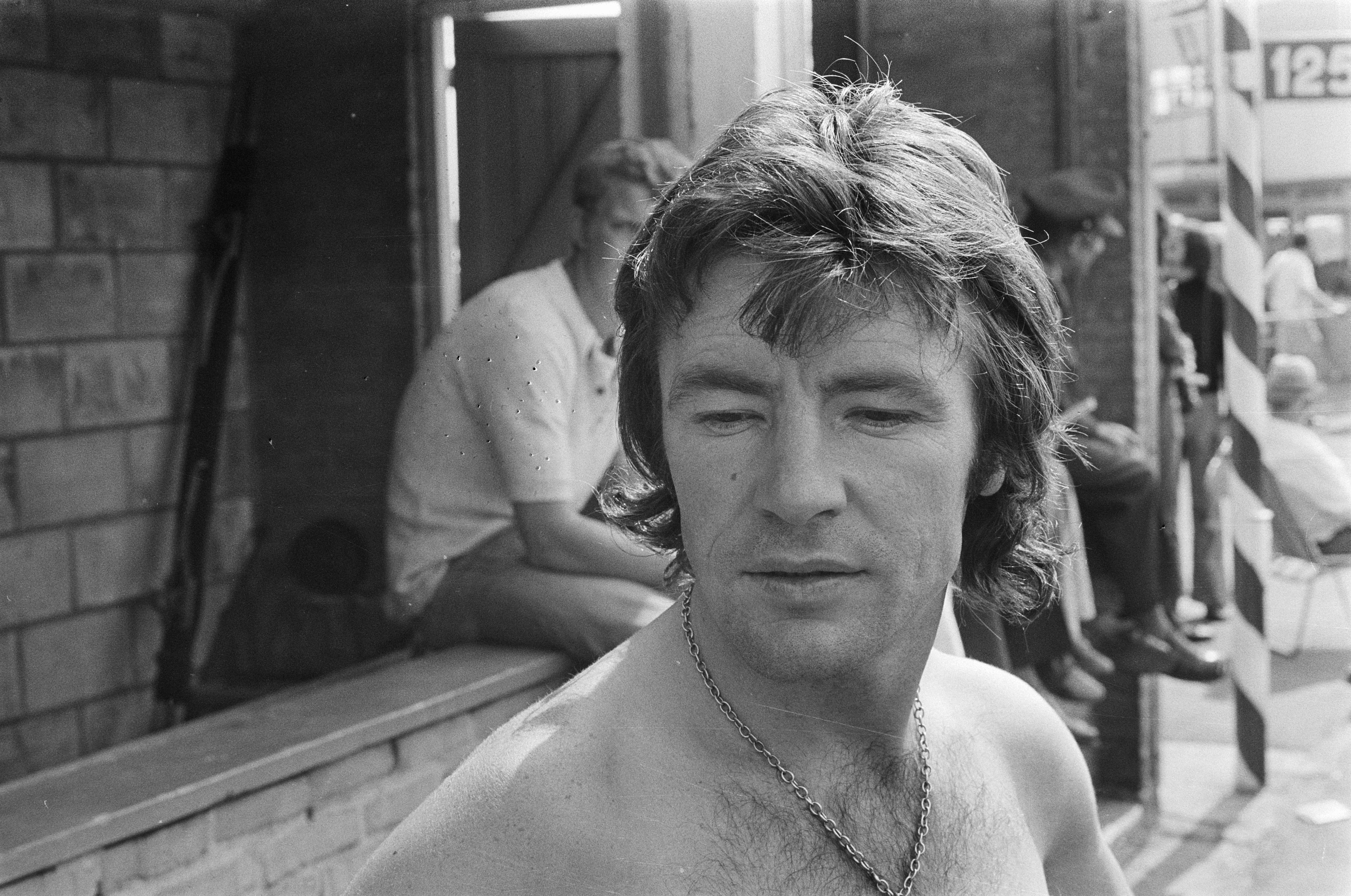 Collectie / Archief : Fotocollectie Anefo Reportage / Serie : TT Assen 1974 Beschrijving : Angel Nieto (Spanje) Datum : 29 juni 1974 Locatie : Assen Trefwoorden : motorcoureurs, motorsport, portretten Persoonsnaam : Nieto, Angel Fotograaf : Peters, Hans / Anefo Auteursrechthebbende : Nationaal Archief Materiaalsoort : Negatief (zwart/wit) Nummer archiefinventaris : bekijk toegang 2.24.01.05 Bestanddeelnummer : 927-2908